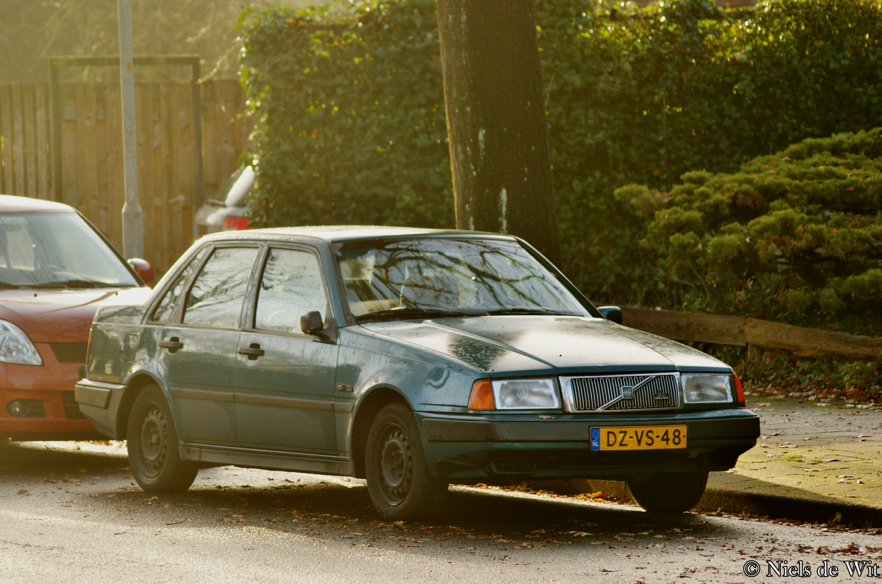 DZ-VS-48